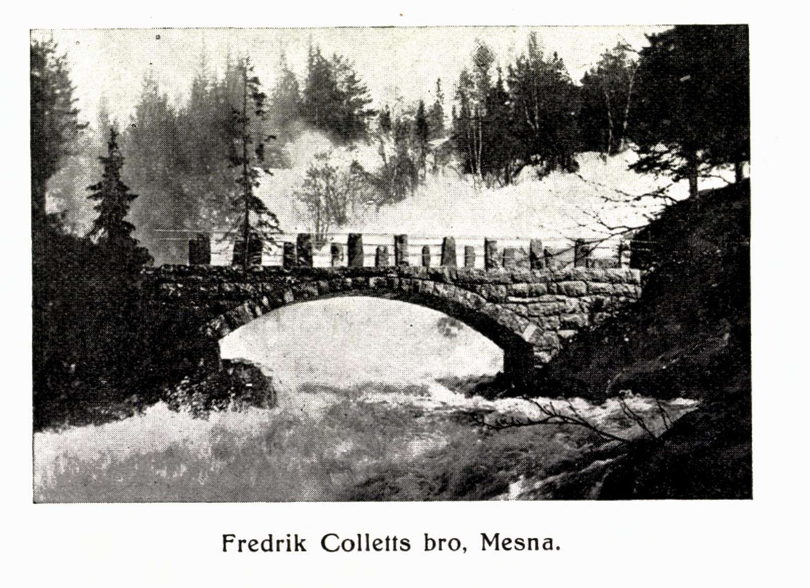 Illustrasjon hentet fra boken "Lillehammer 1827-1927" av og utgitt av (Lillehammer, 1927)